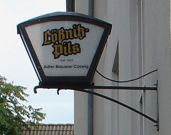 Reklame des Lößnitz-Pils